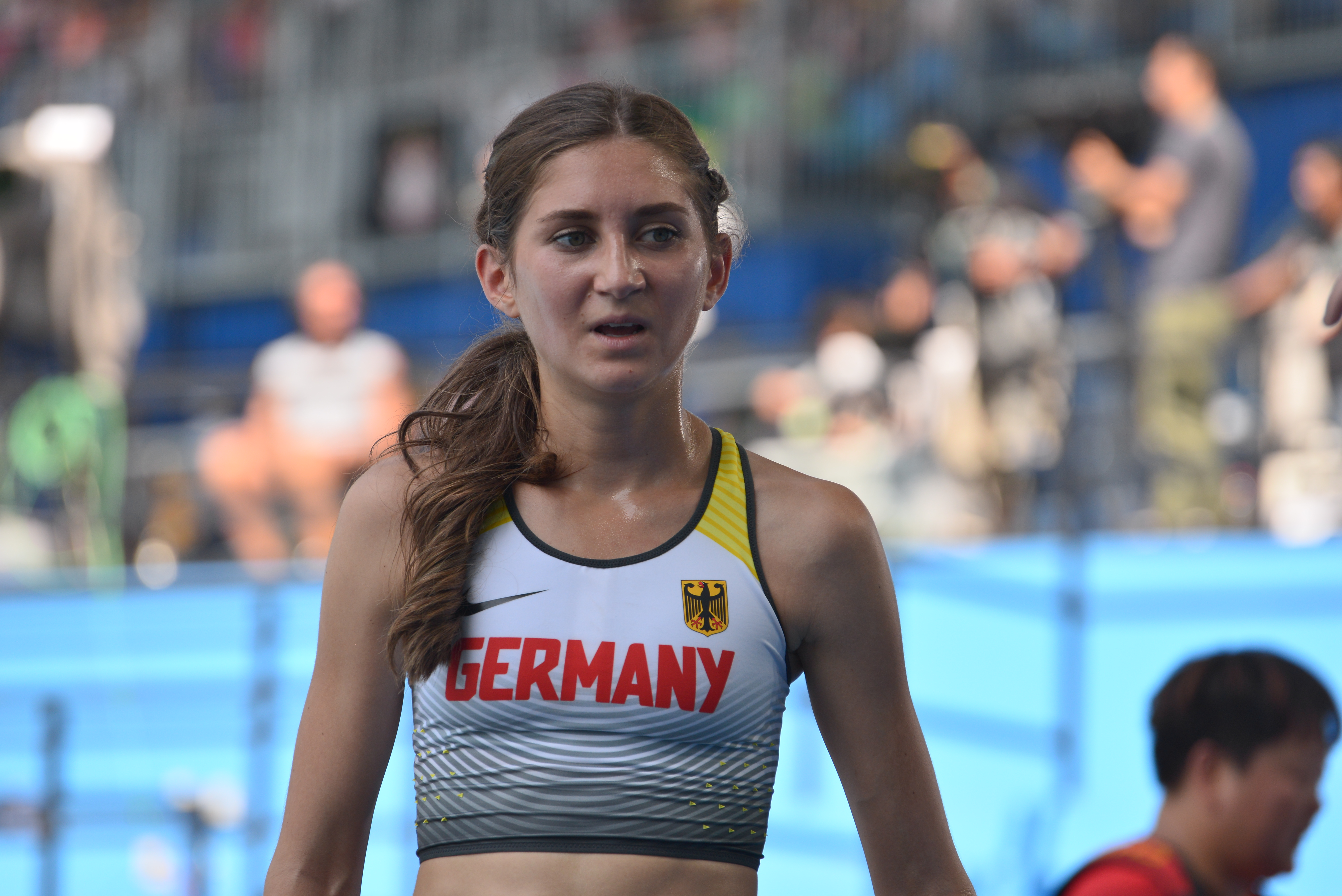 Gesa Felicitas Krause en finale du 3000m steeple des JO de Rio, 2016